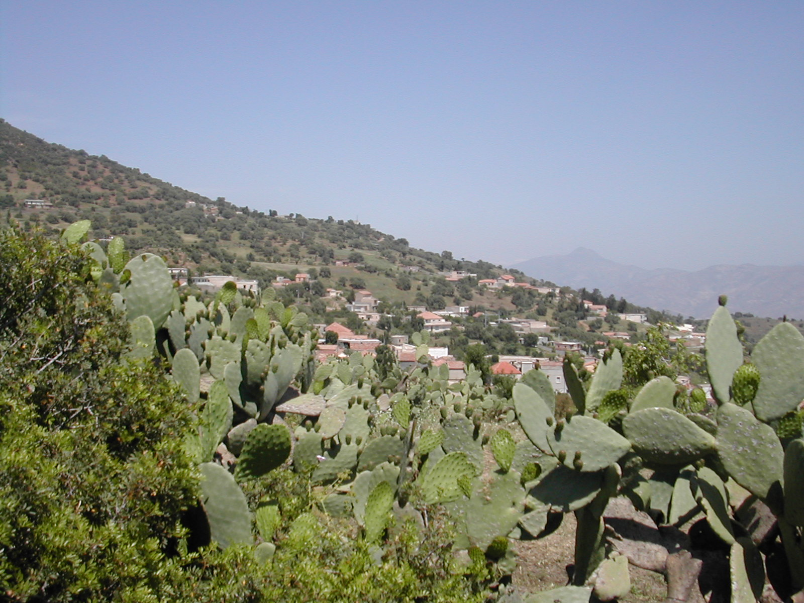 une photo du village Ighil Oumced